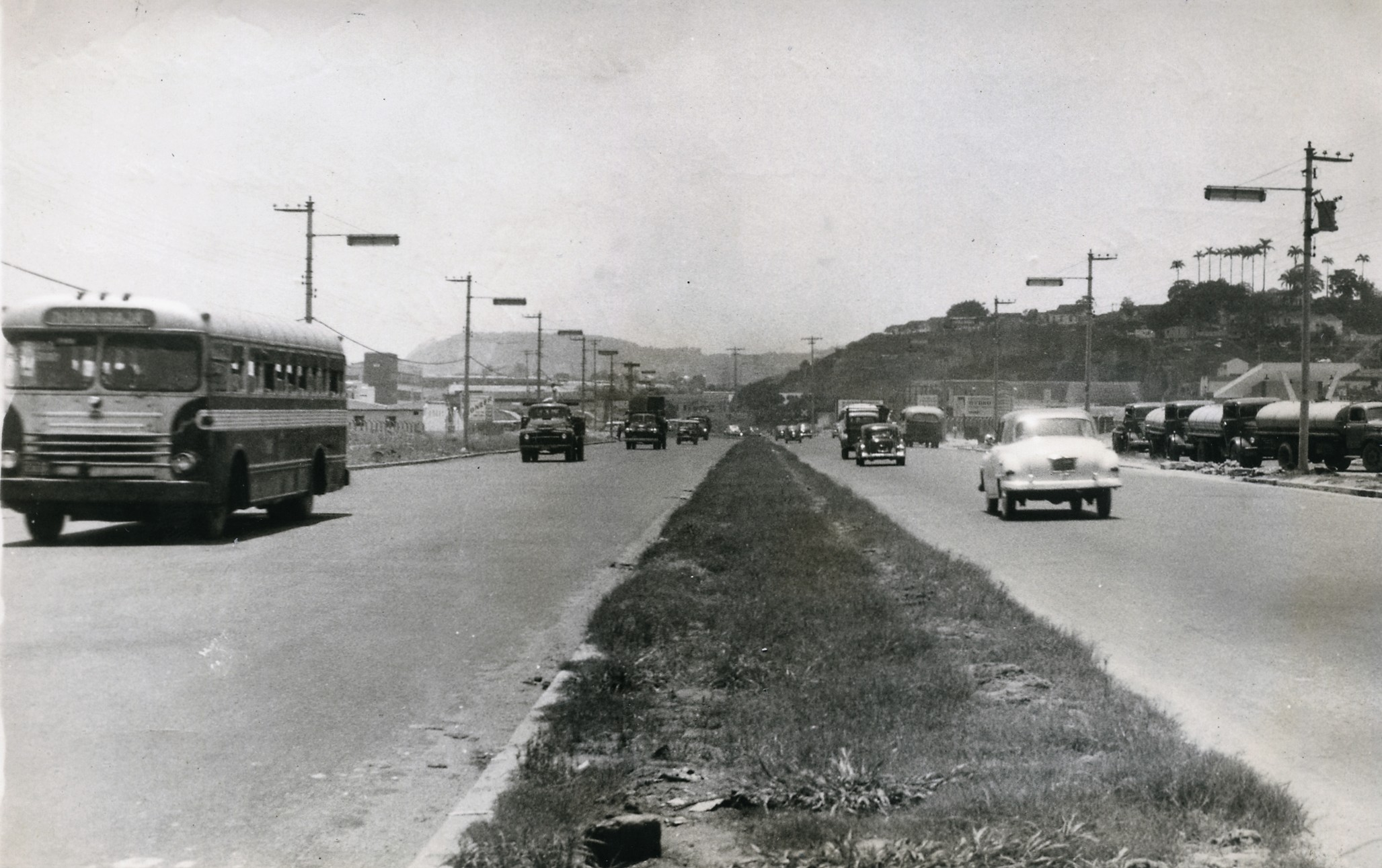 Fotografia do Fundo Correio da Manhã, sob a guarda do Arquivo Nacional.